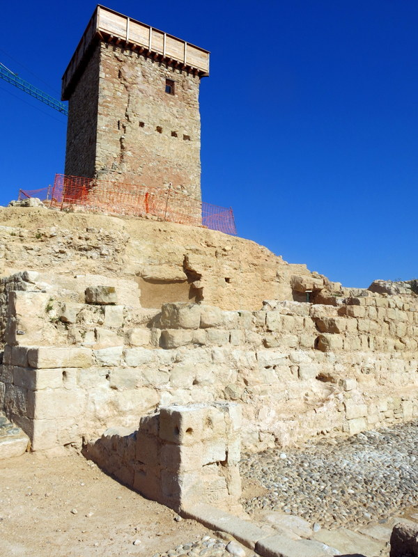 Castell d'Ascó a la Ribera d'Ebre - Catalunya